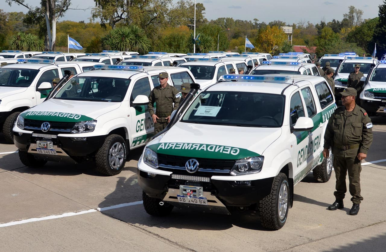 Vehículos de la Gendarmeria Nacional